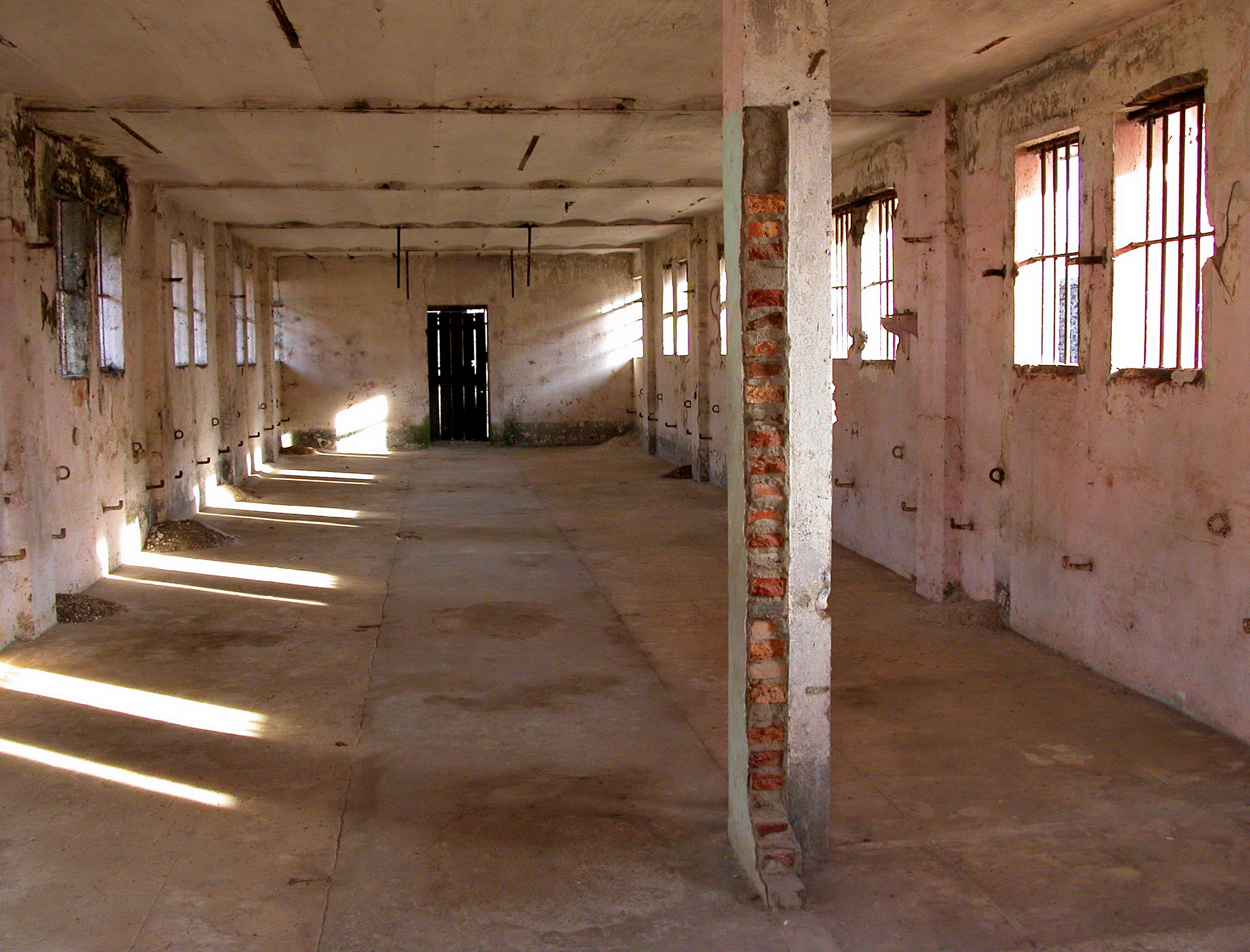 Camp de la Transportation, (Classé, 1995) .